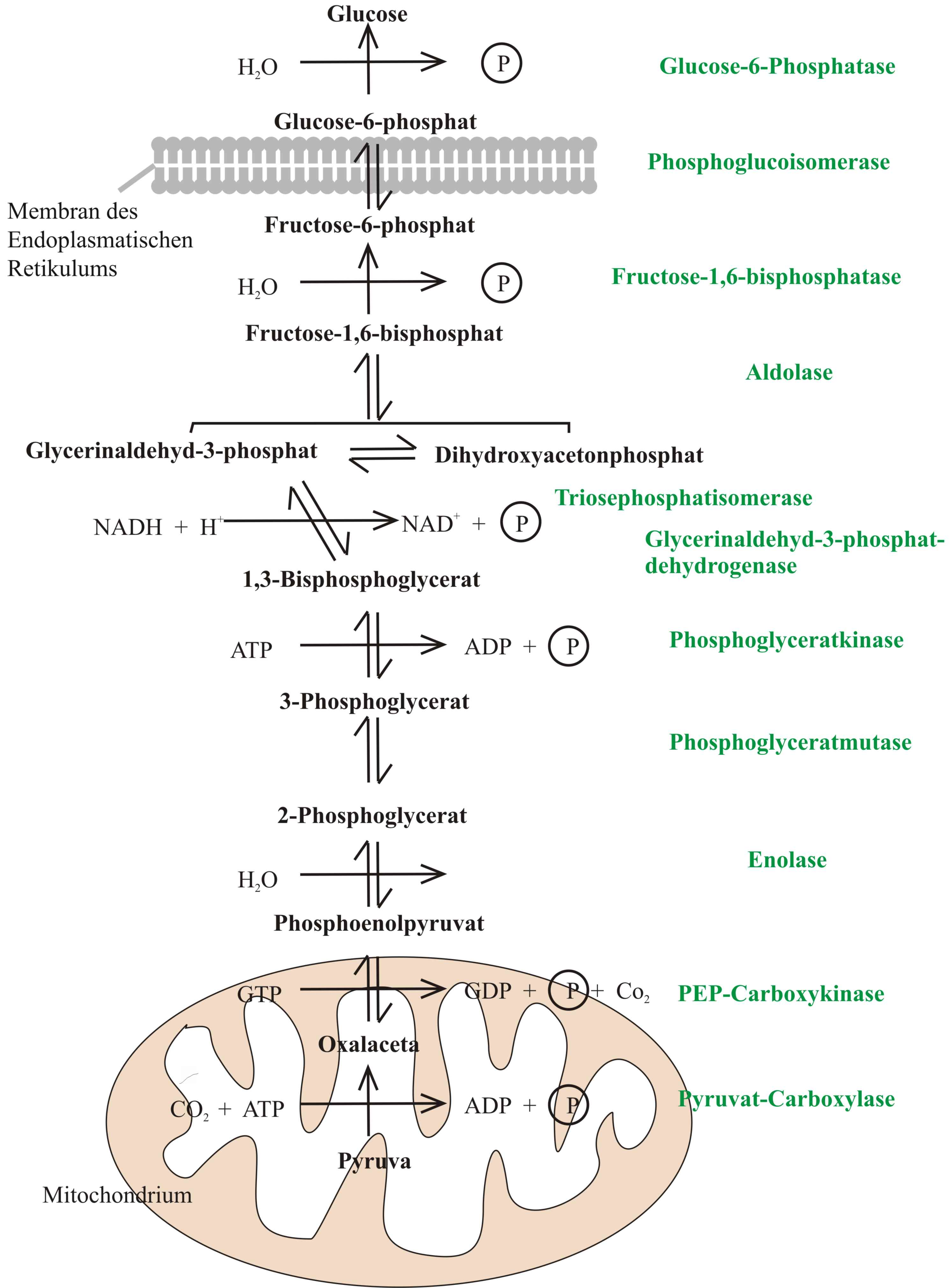 Schematische Darstellung der Gluconeogenese